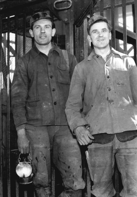 Wernigerode, Bergarbeiter Zentralbild Biscan - 4 Motive 26.4.1954 2 Sonderschichten für das Deutschland-Treffen. In den Harzer Eisenerzgruben am Büchenberg bei Wernigerode haben sich Werner Kubatz und die von ihm geleitete Brigade "IV. Parteitag" verpflichtet, zwei Sonderschichten zu Ehren des Deutschland-Treffens der Jugend zu fahren. Der Erlös der beiden Sonderschichten wird dem Sammelfonds zur Verfügung gestellt und soll westdeutschen Jugendlichen ermöglichen, am Deutschlandtreffen teilzunehmen. UBz: Brigadier Werner Kubatz (links) und Häuer Herbert Stadach von der Brigade "IV. Parteitag".